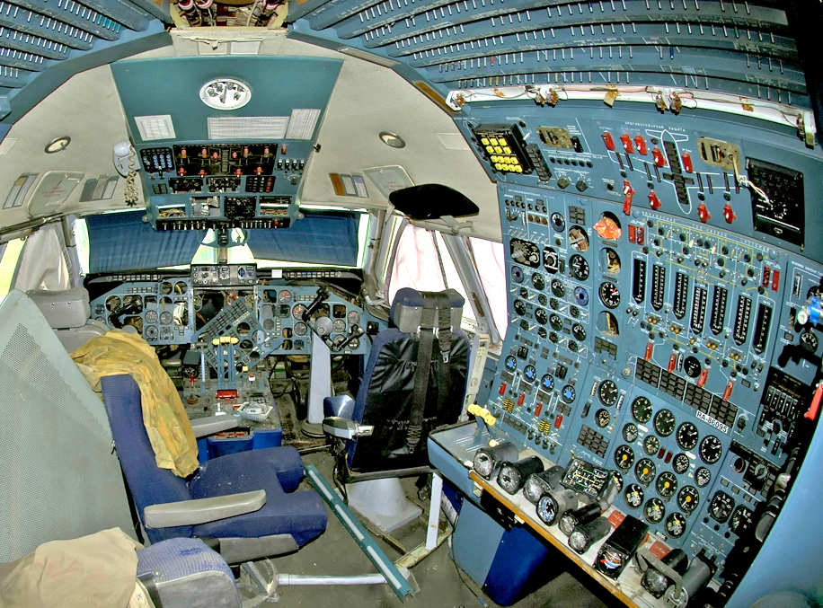 Cockpit Il-86 RA-86095